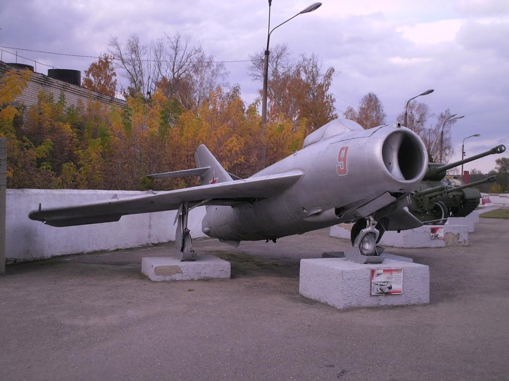 МиГ-17 , монумент погибшим в Великой Отечественной войне, посёлок Шатки Нижегородской области РФ.